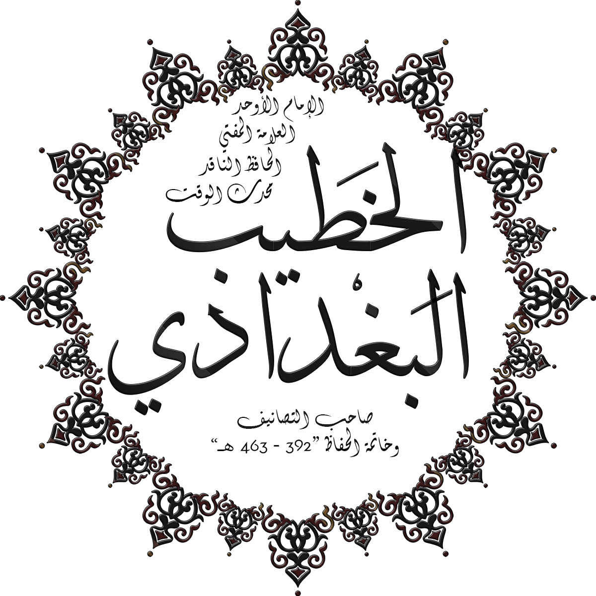 اسم الخطيب البغدادي بخط الديواني.